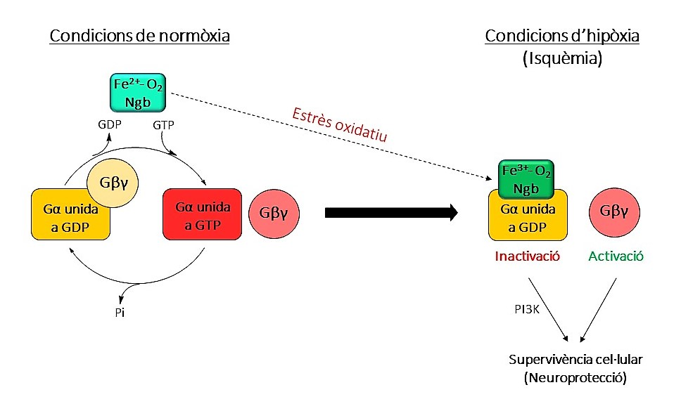 En condicions d'hipòxia davant l'estrès oxidatiu, la neuroglobina fèrrica (Ngb-Fe 3+) s'uneix a la subunitat α, afavorint la neuroprotecció.